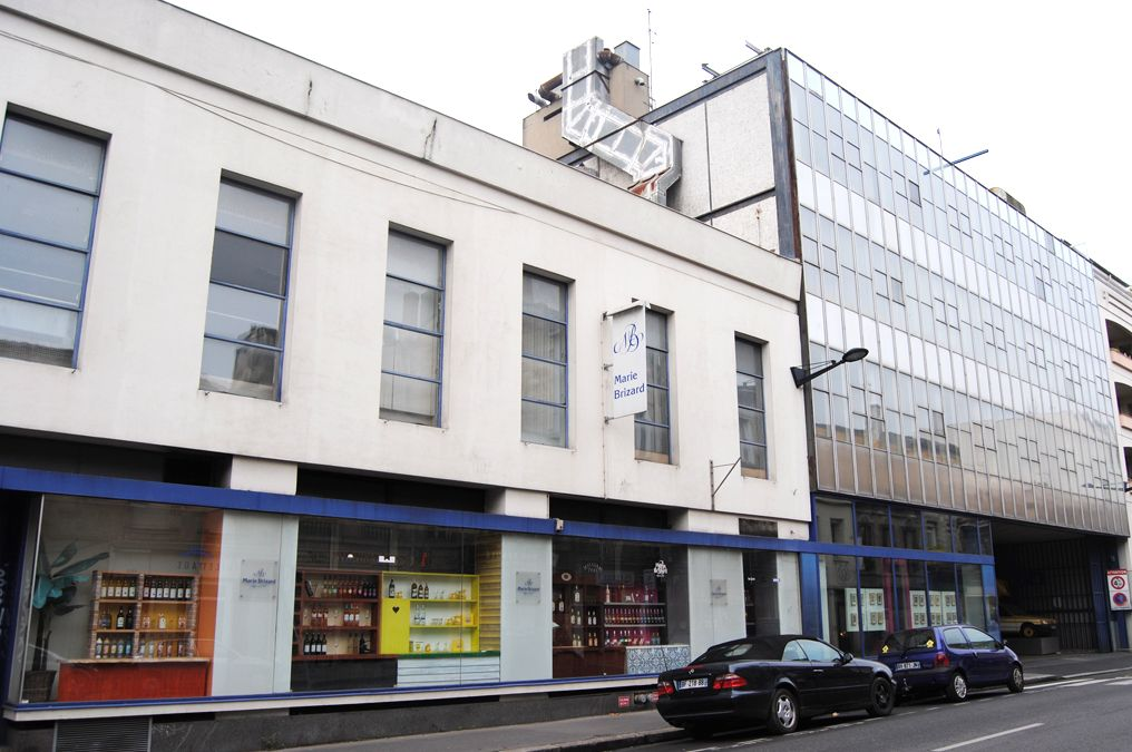 130-142 rue Fondaudege